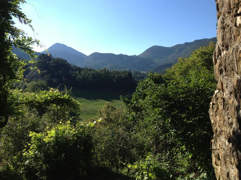 Vue depuis le village